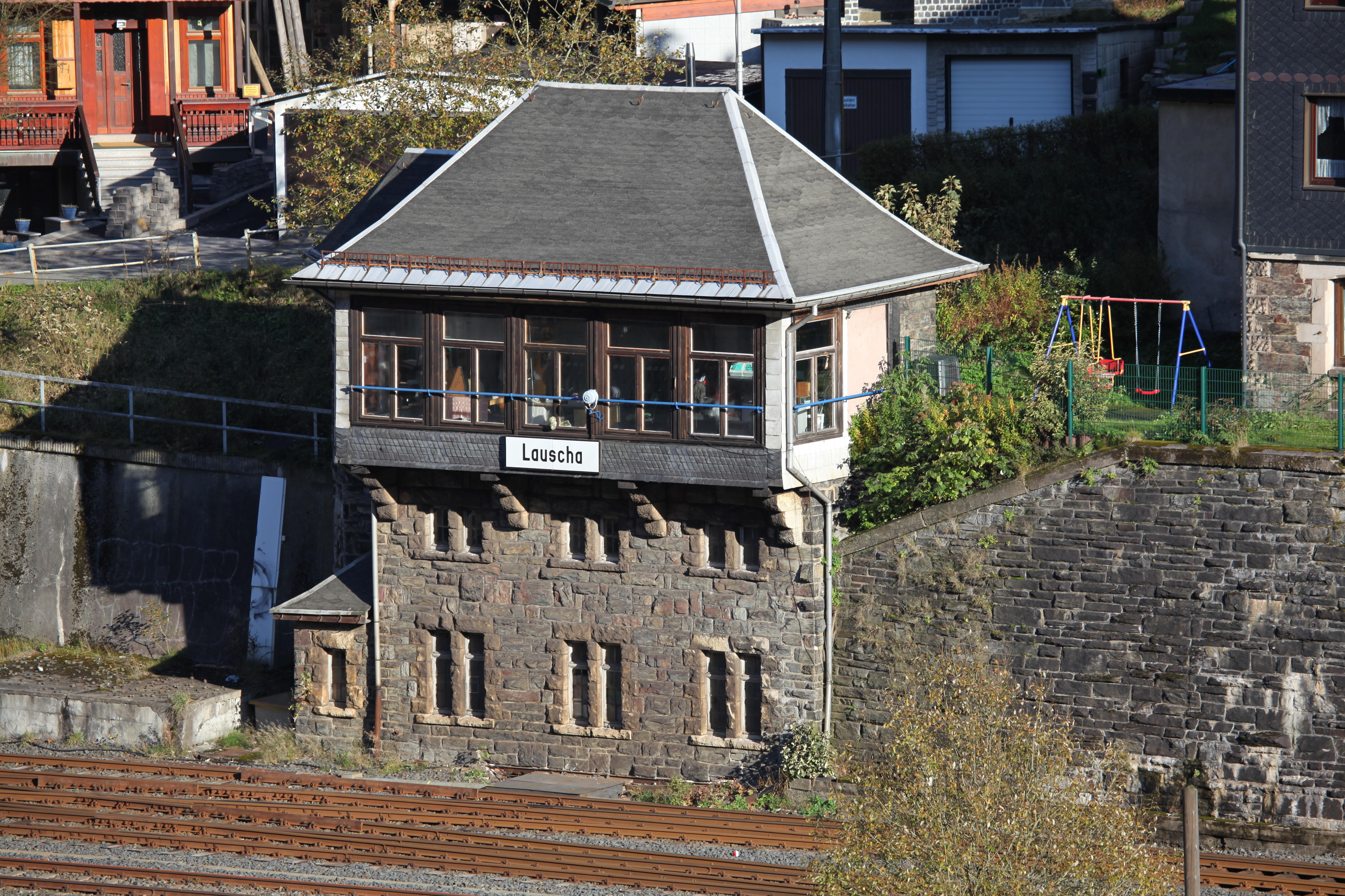 Bahnhof-Stellwerk, 1913, Ing. Jacobi und Steinbrick, Lauscha, Bahnhofstraße 31